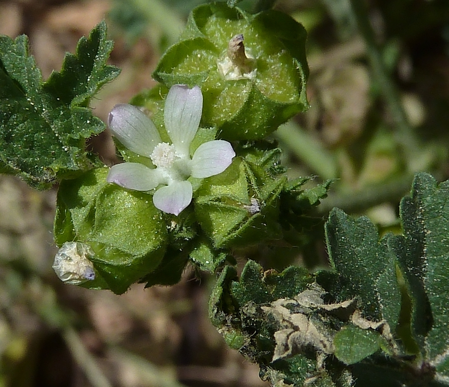 Malva parviflora (Malva, malva de flor chica): Inflorescencia axilar con flores en antesis y post-antesis - Descampado c./ San Antonio con Compositor Manuel Berná García, Albatera (Alicante, España).